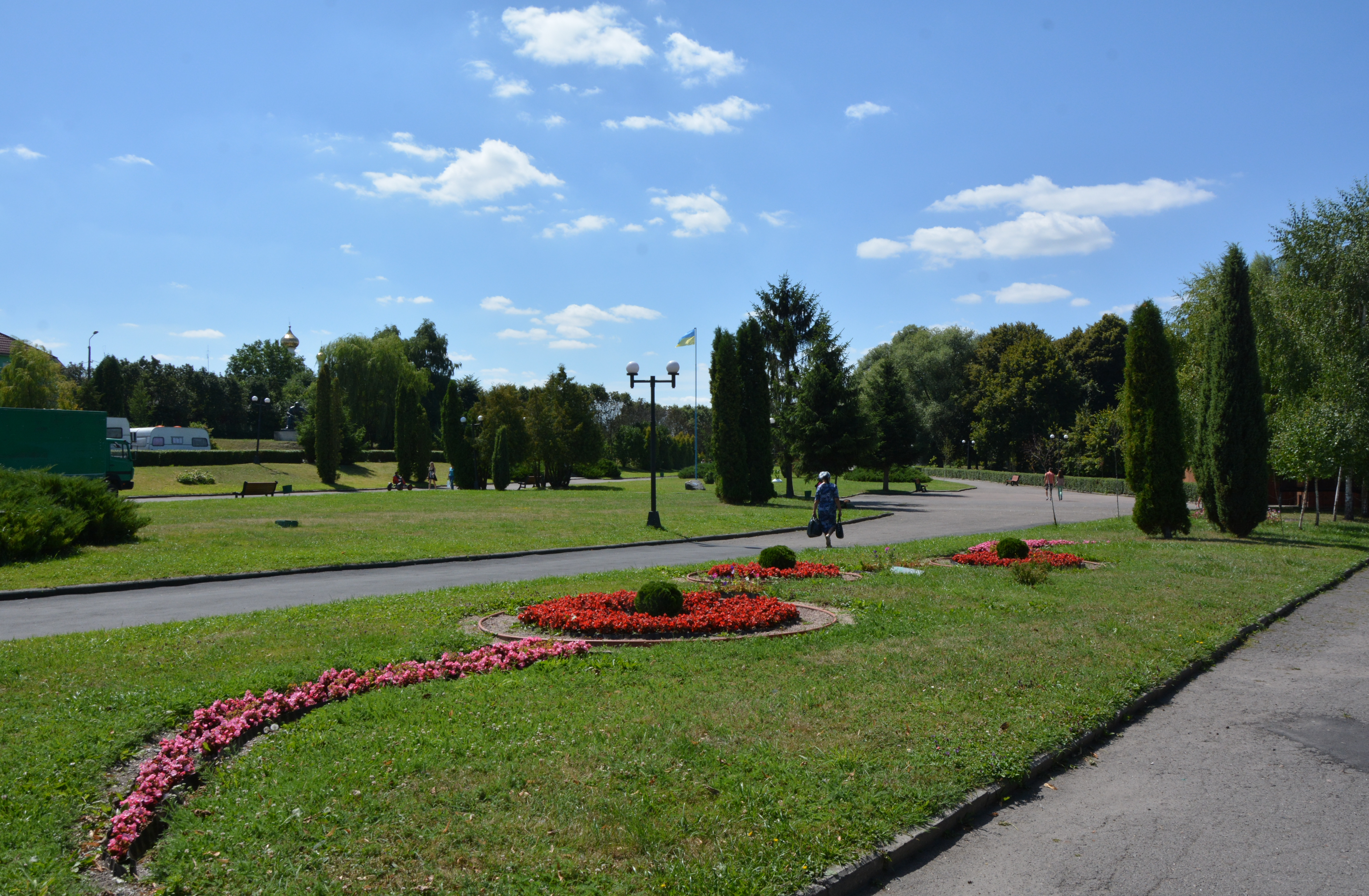 «Слов'янський» парк, м. Володимир-Волинський